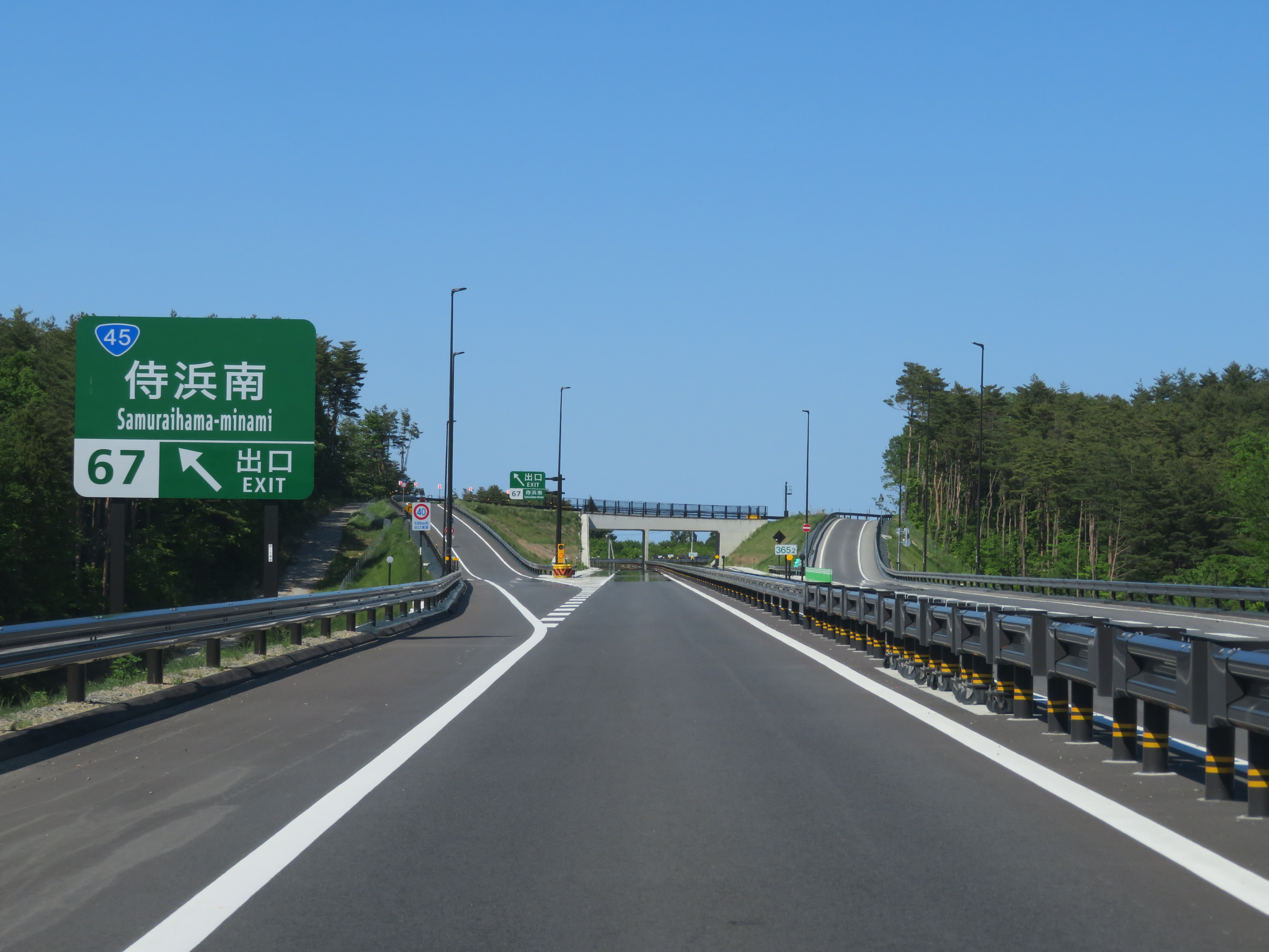 八戸久慈自動車道侍浜南ＩＣ出口付近（久慈歩面側から撮影） Canon PowerShot SX720 HS